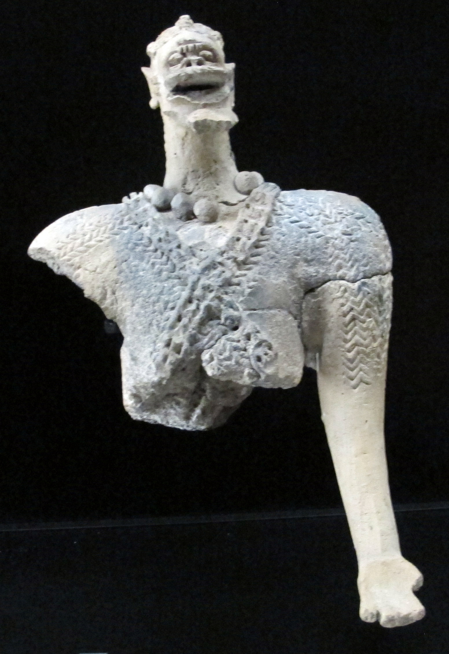 Museo di Quai Branly, Parigi